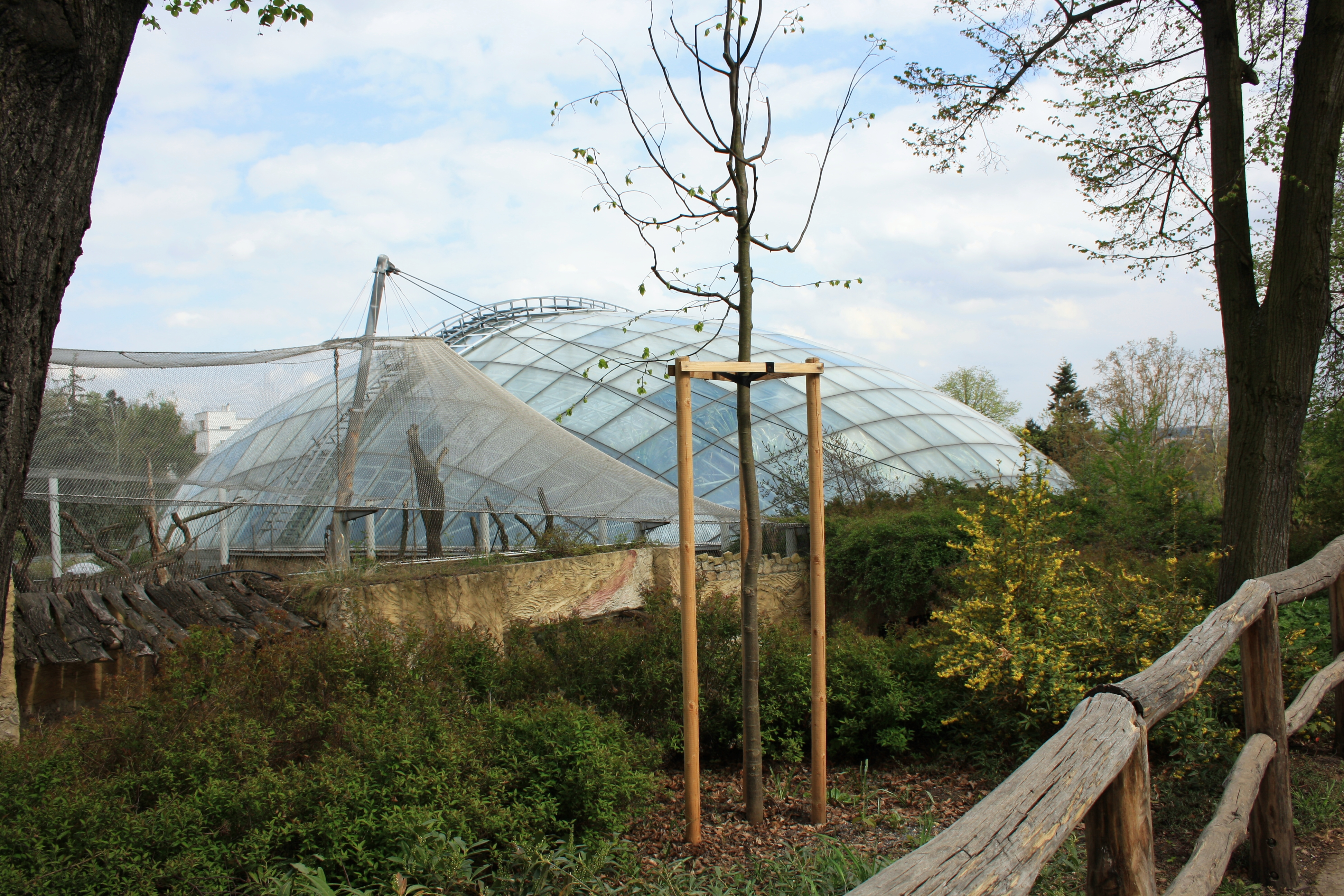 Zoo Praha